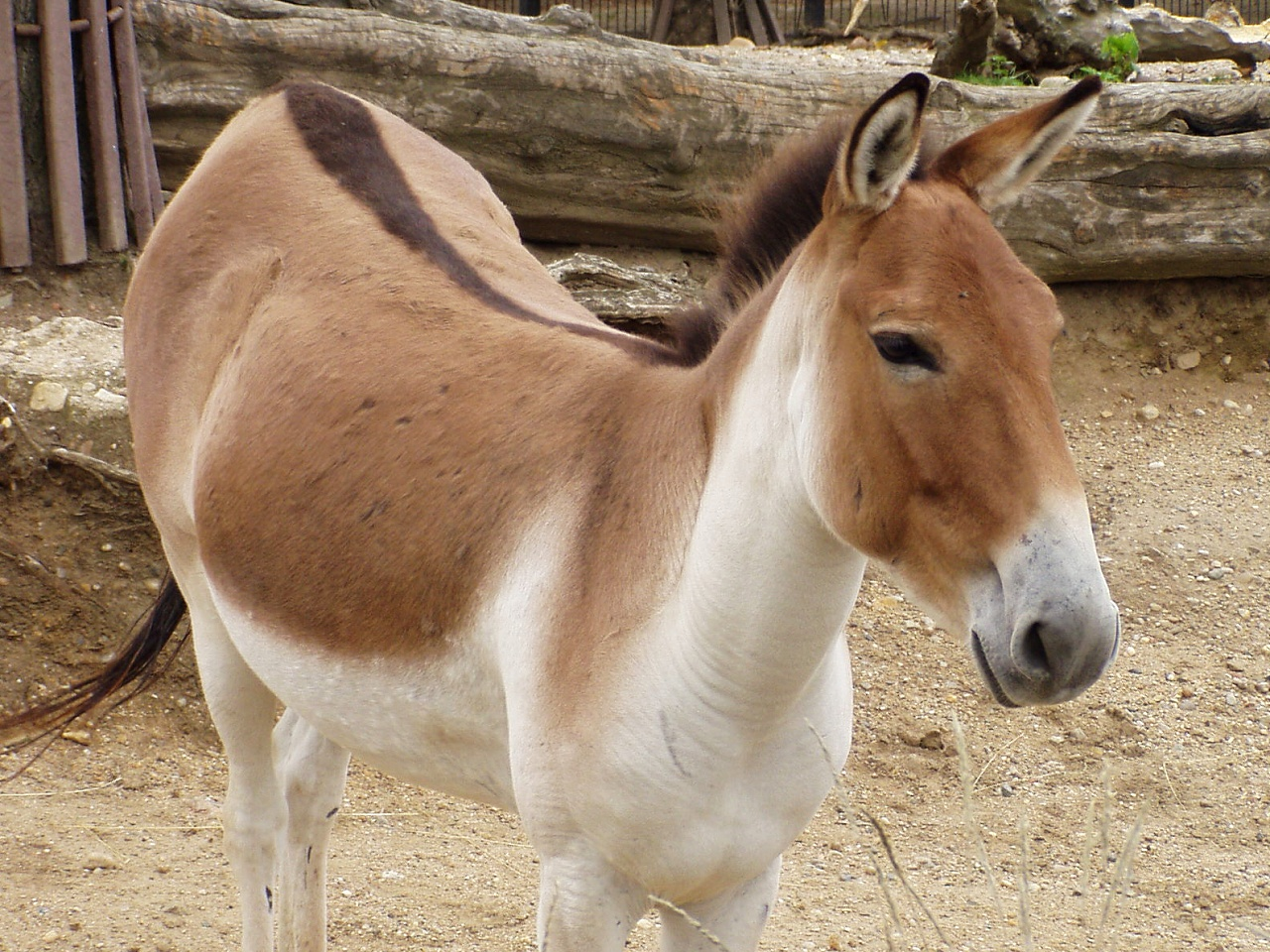 Equus kiang holdereri (Prague Zoo)